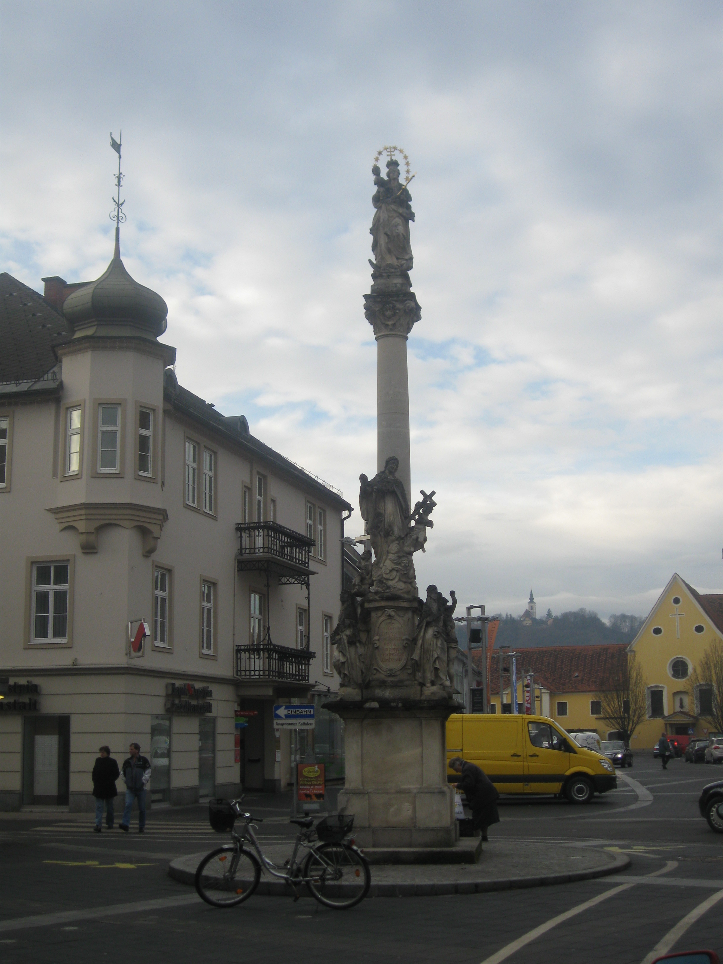 Mariensäule auf dem Hauptplatz in Leibnitz